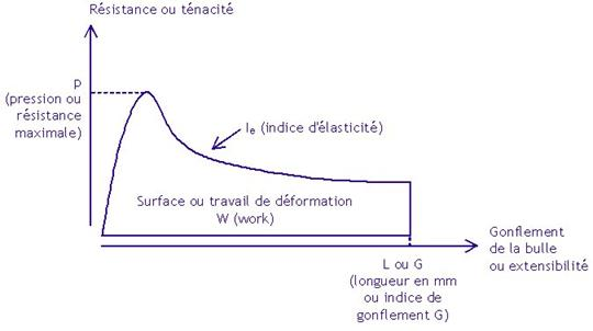 Alveogramme de Chopin